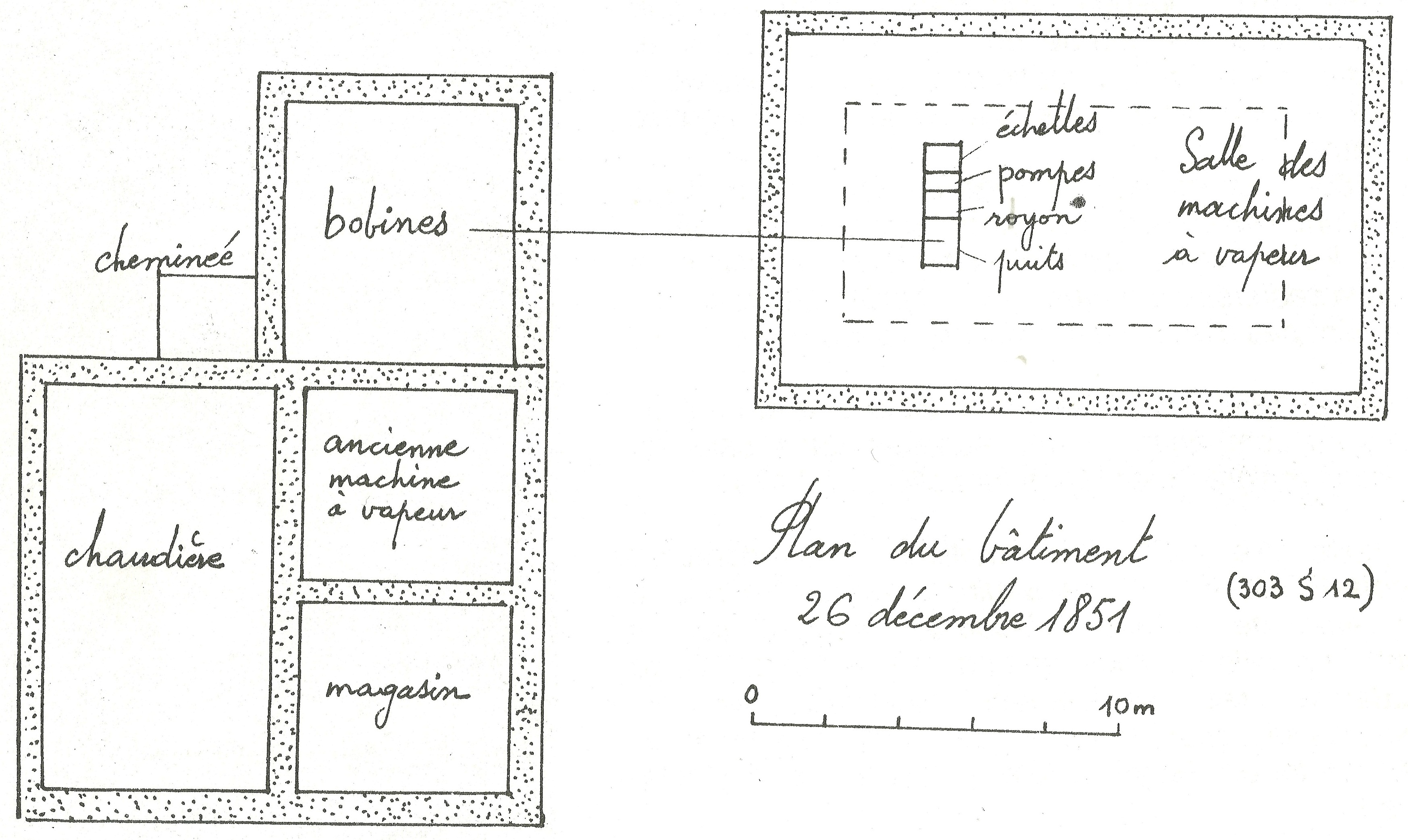 Plan du puits Saint-Charles (houillères de Ronchamp).